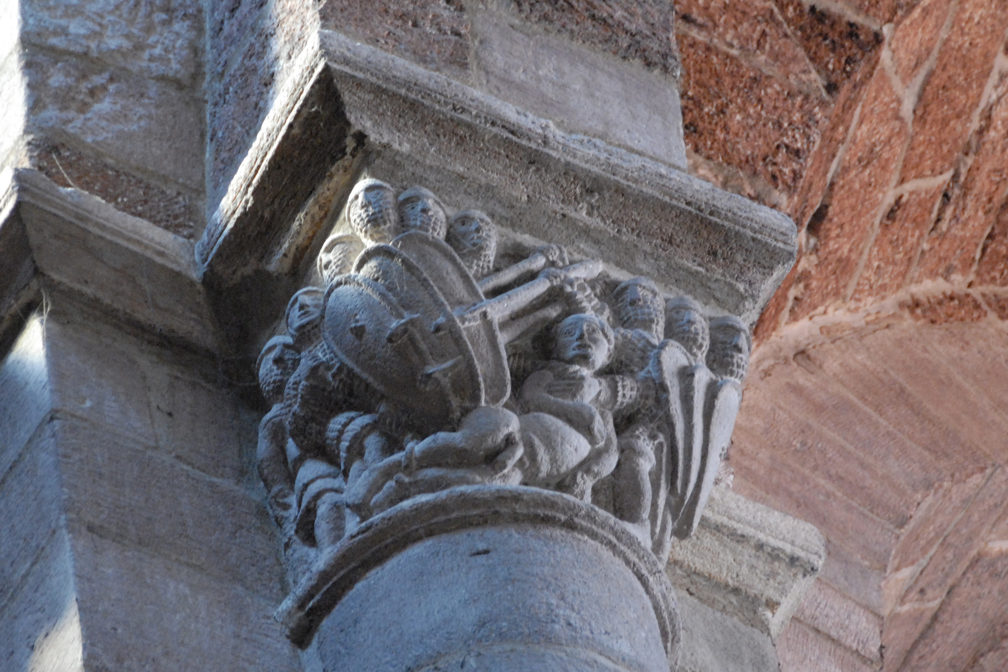 St.-Julien Brioude, Kapitell, Soldaten ergreifen nackten Mann